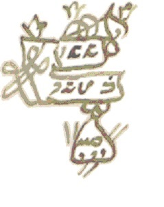 חתימת השמן ששון